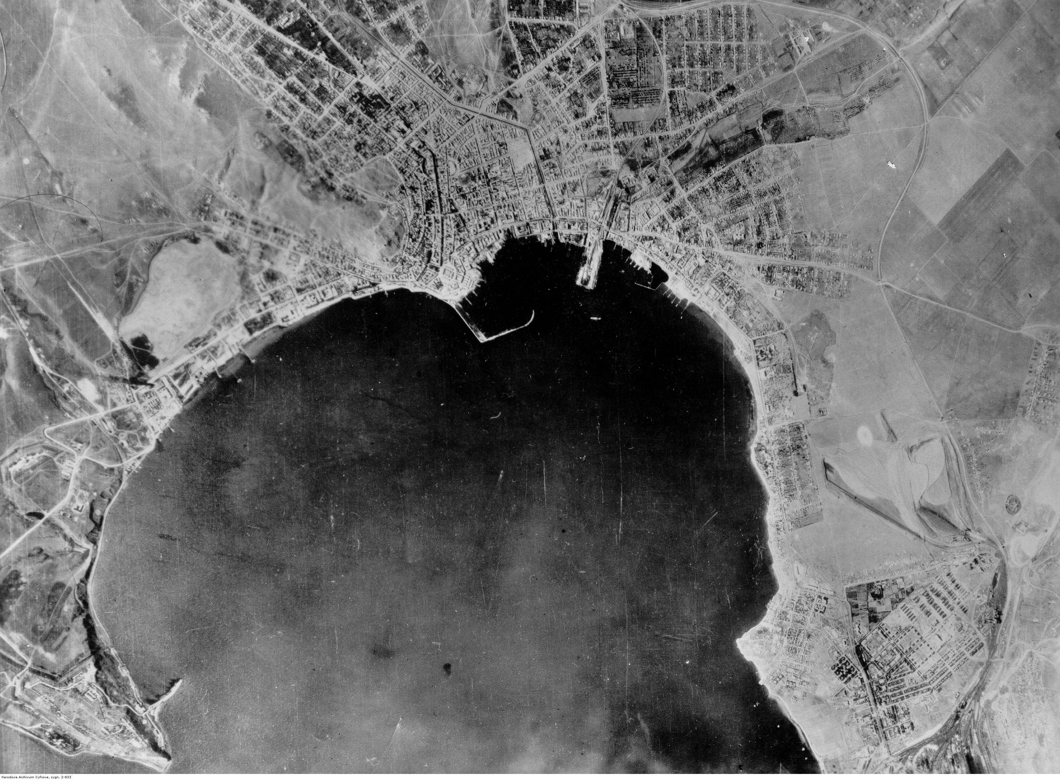 Kercz - fotografia lotnicza.